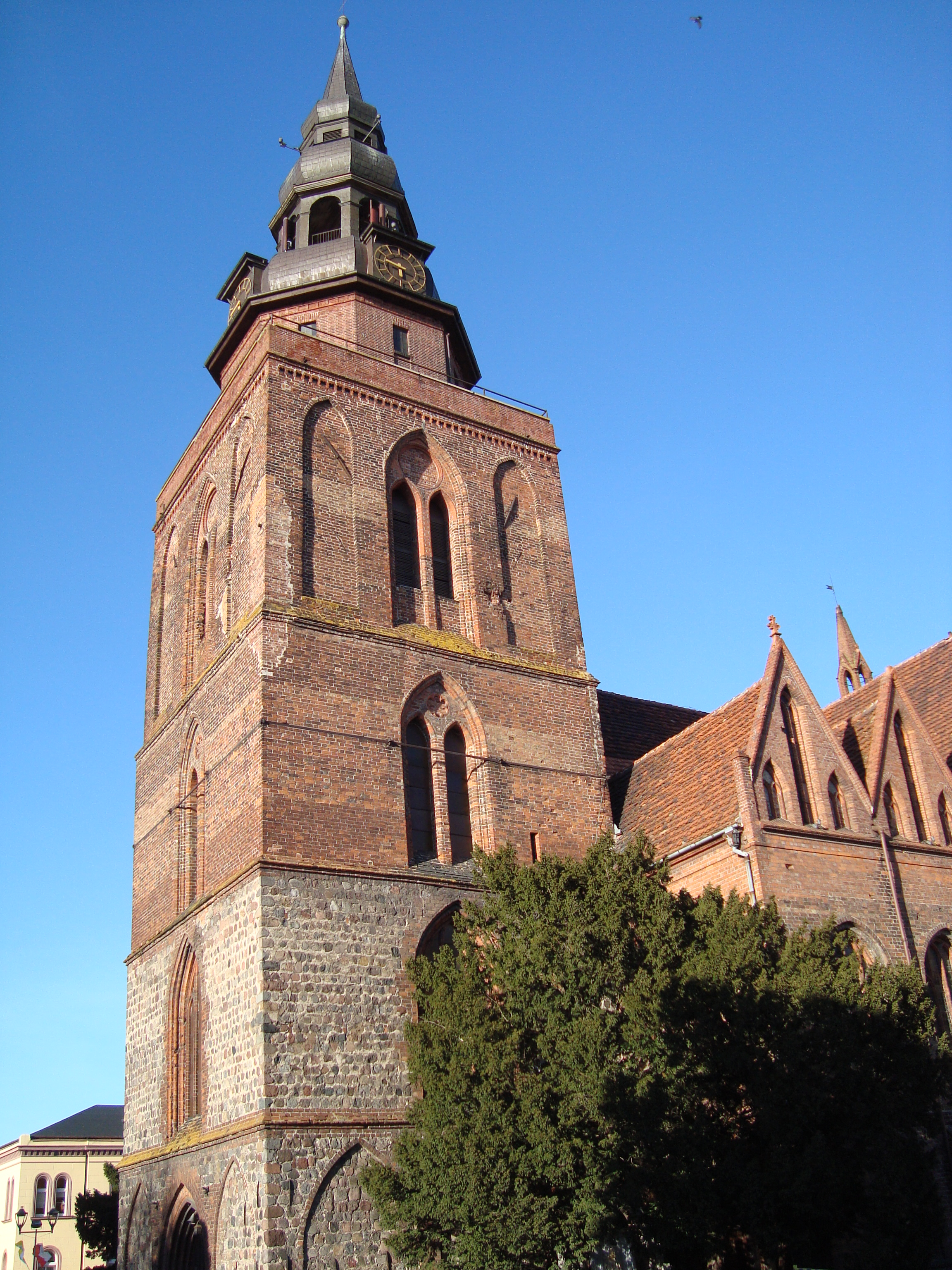 Wieża późnoromańsko-gotyckiego kościoła pod wezwaniem Narodzenia NMP w Gryfinie (zabytek nr rejestr. 97)